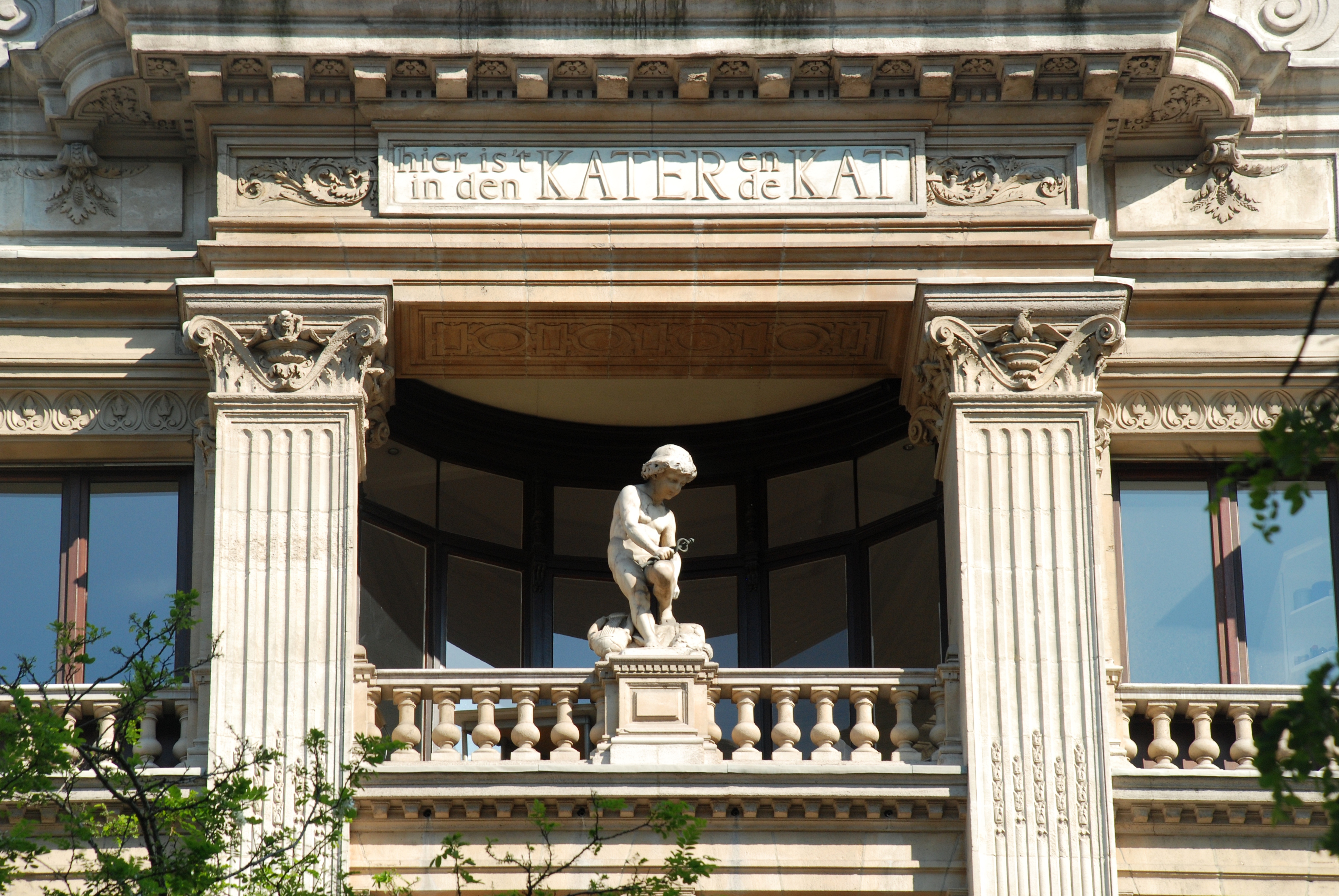 Belgique - Bruxelles - Maison des Chats (1872-1785; architecte Henri Beyaert)